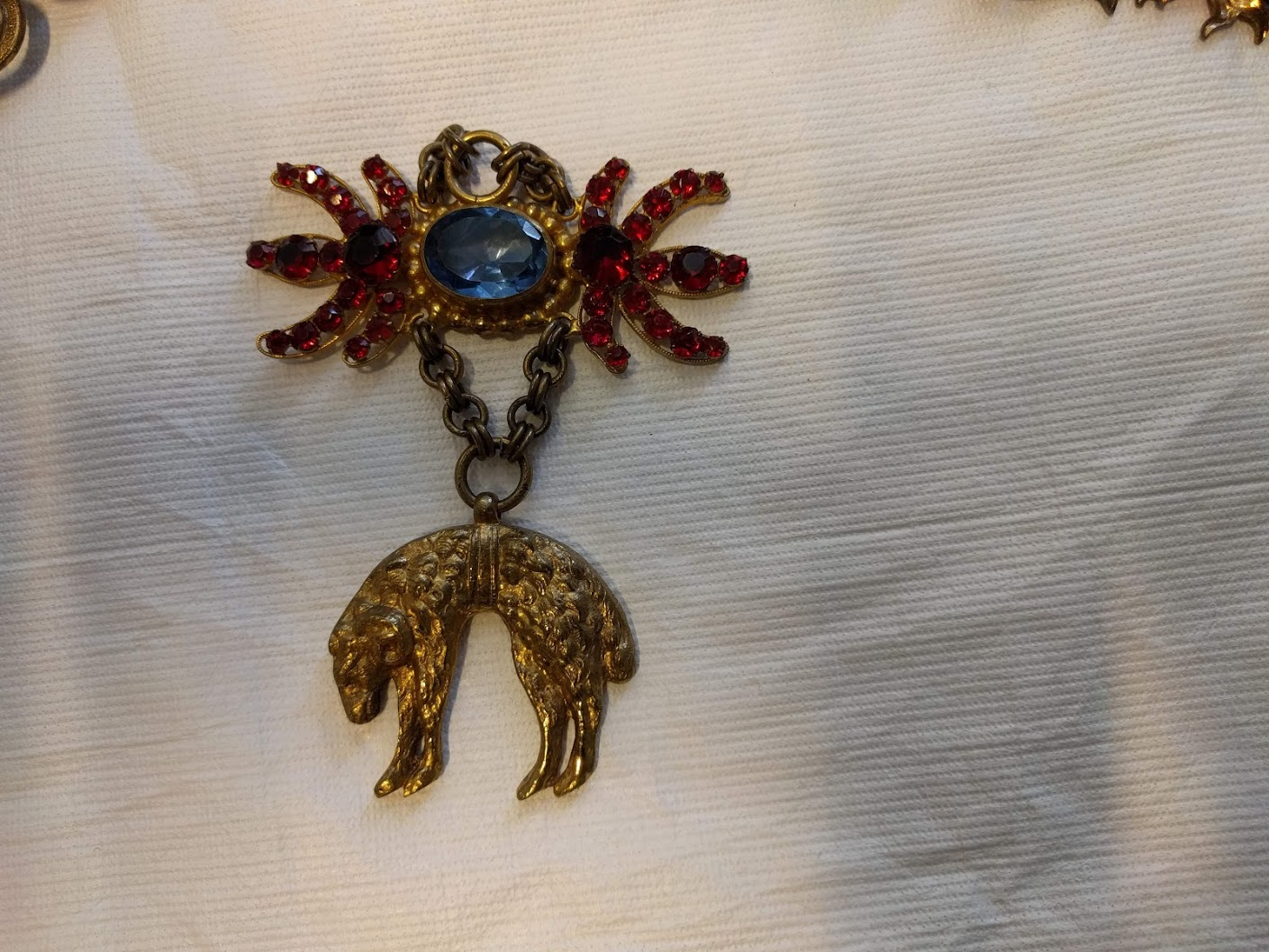 Gulden Vlies uit de collectie van museum Grand Curtius Luik